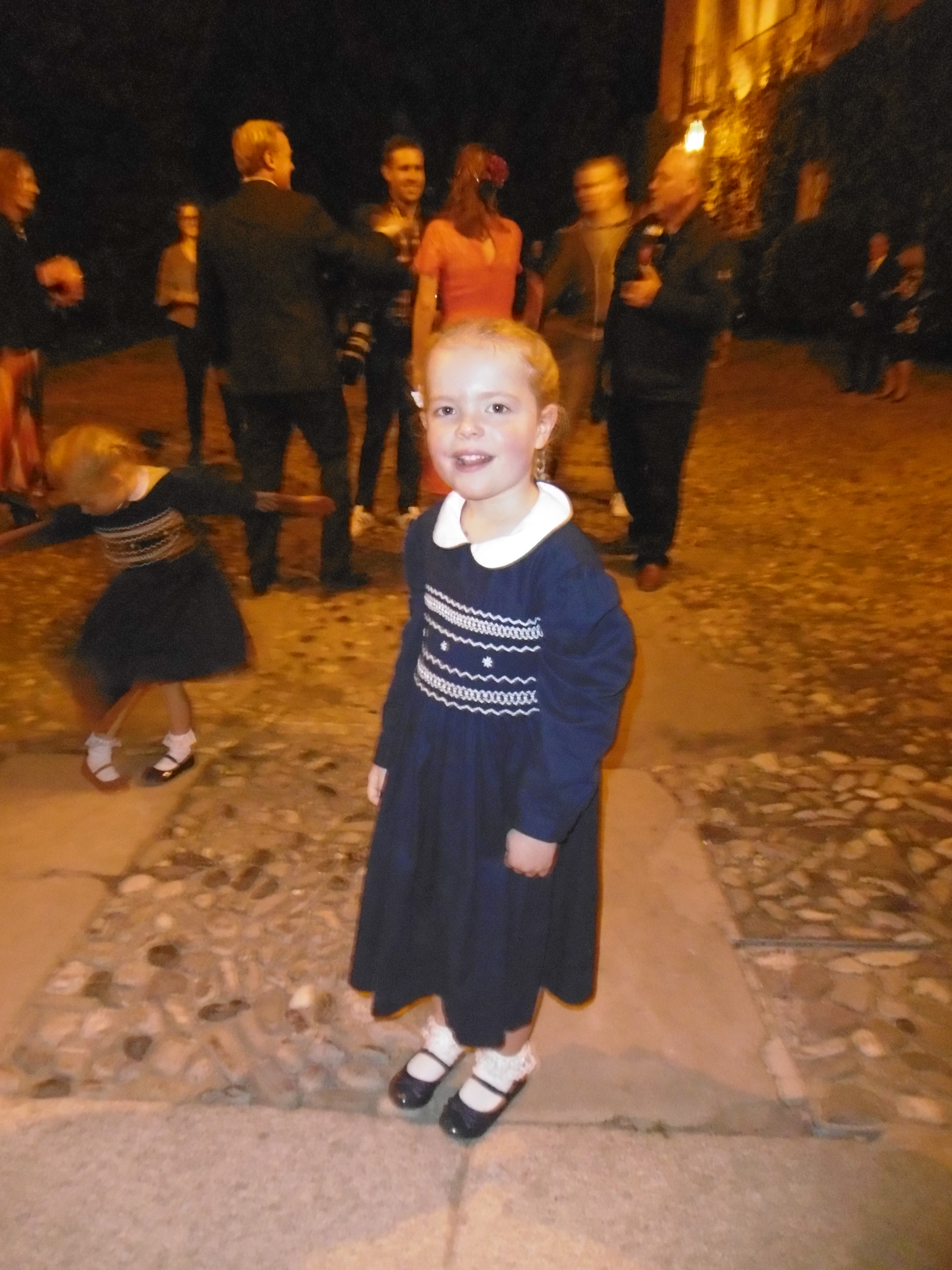 La principessa Luisa Irene di Borbone-Parma nata a L'Aia il 9 maggio 2012, figlia del principe Carlo Saverio e di Annemarie Cecilia Gualthérie van Weezel